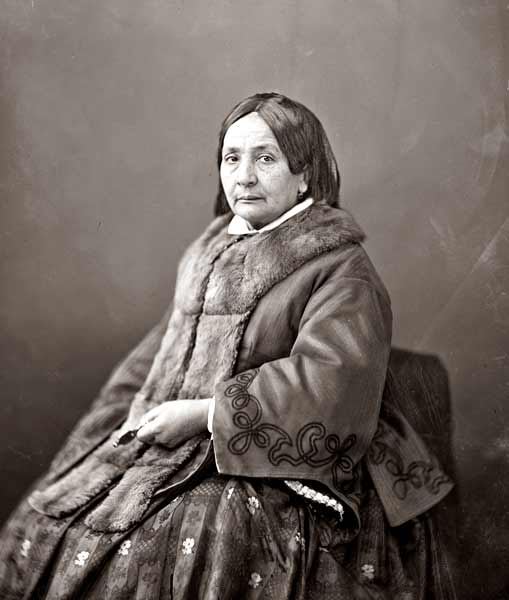 Eugénie Niboyet (1796-1883), femminista francese